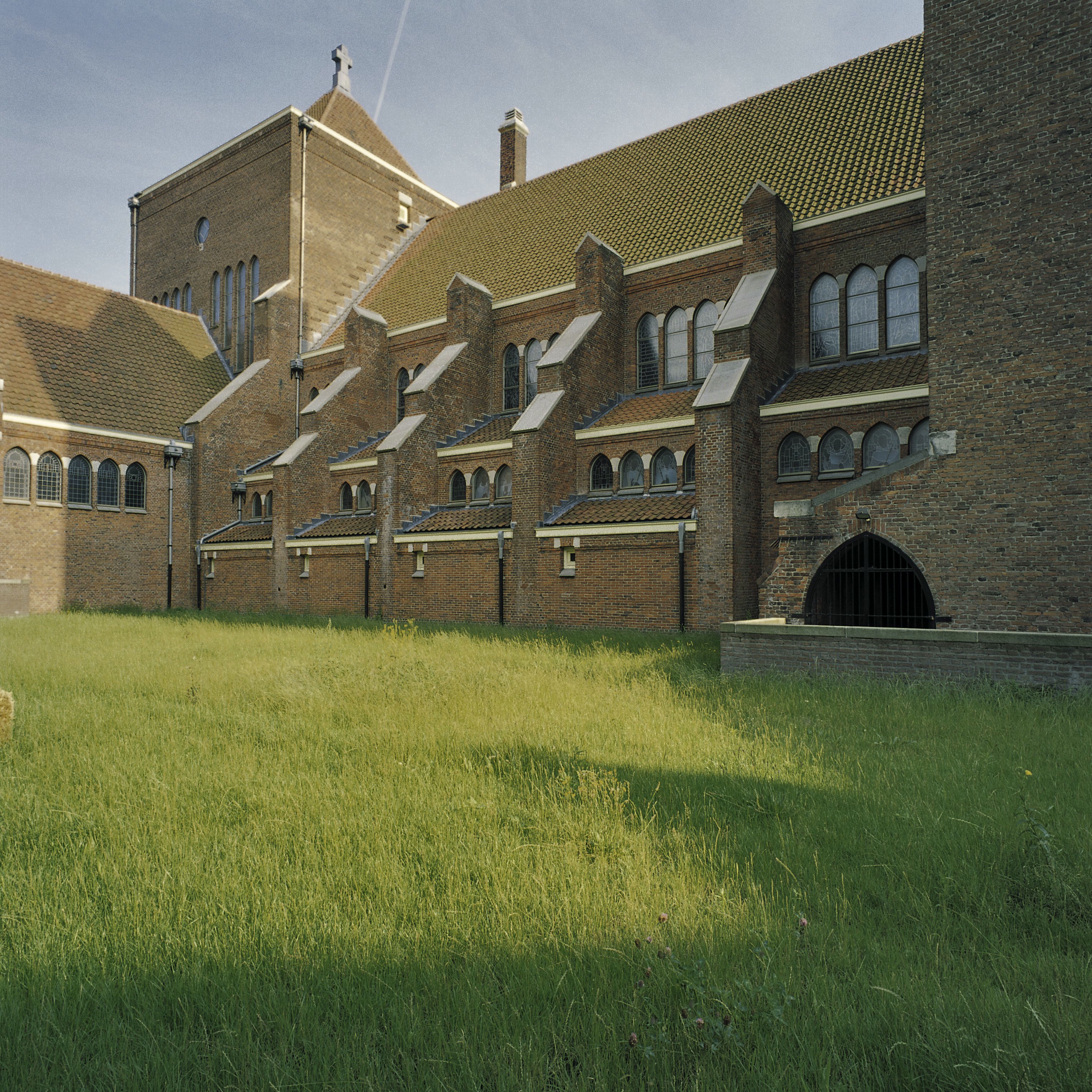 Rooms-katholieke kerk van de Heilige Martelaren van Gorcum: Overzicht noordgevel (opmerking: Boek: "66 Kanjermonumenten")